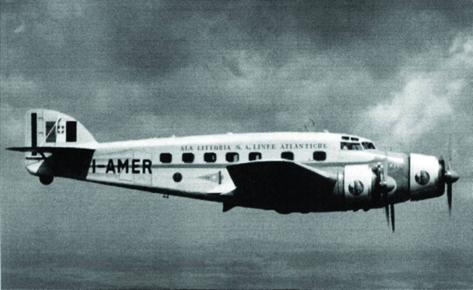 Savoia Marchetti SM.83 I-AMER civile, n.c. 34019.